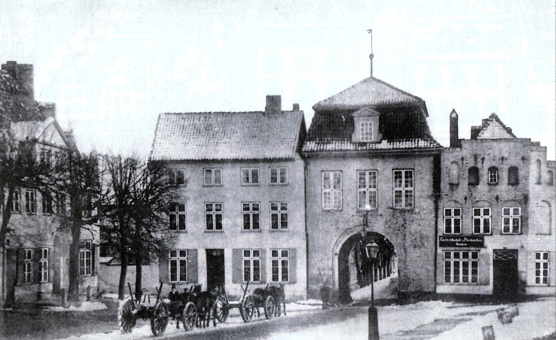 Das innere Mühlentor in Lübeck, stadtseitig